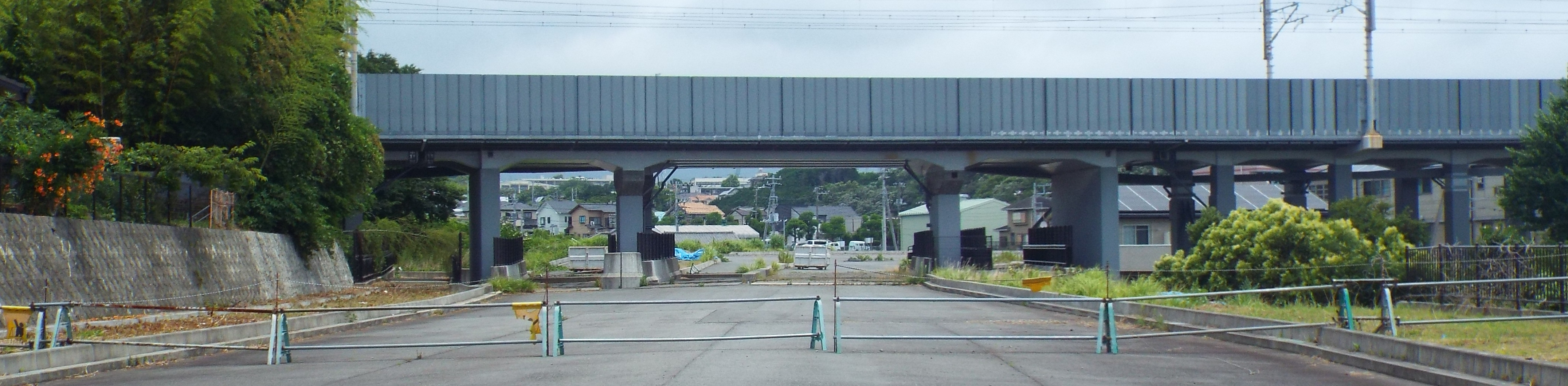 をトリミングした画像。